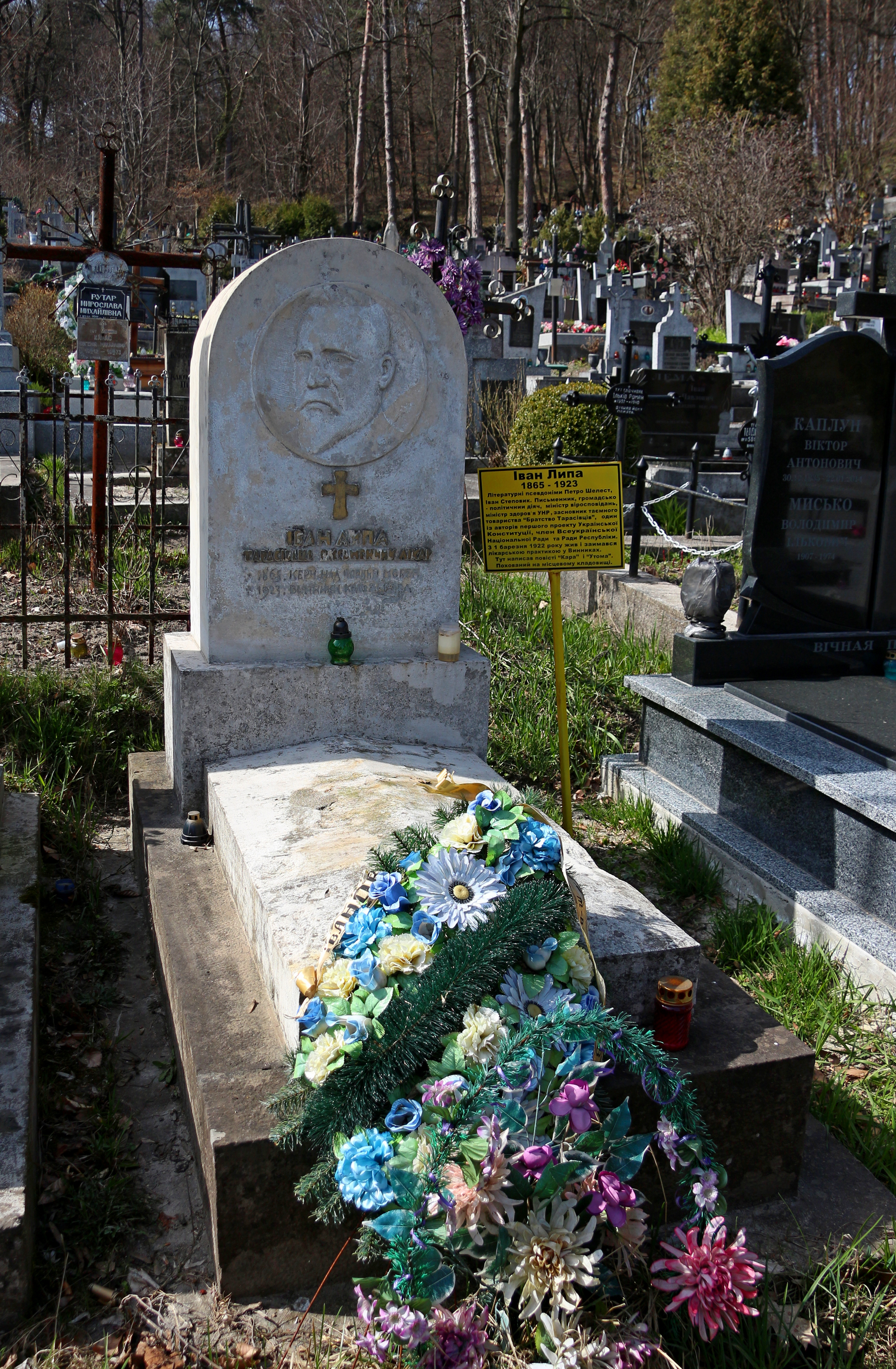 Надгробок на могилі Івана Липи. Цвинтар м. Винники.